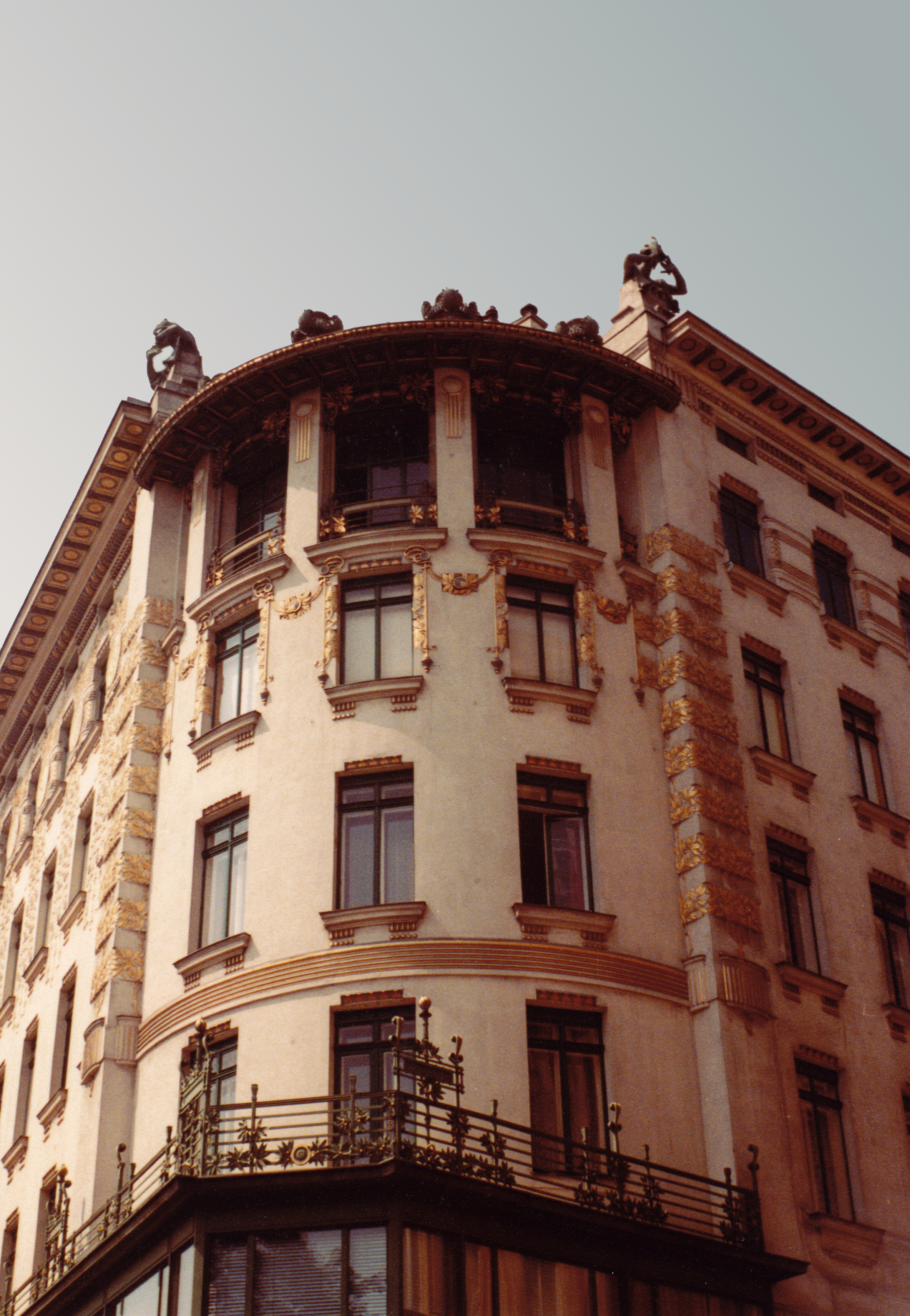 Autriche - Vienne - Linke Wienzeile 38 (architecte Otto Wagner)